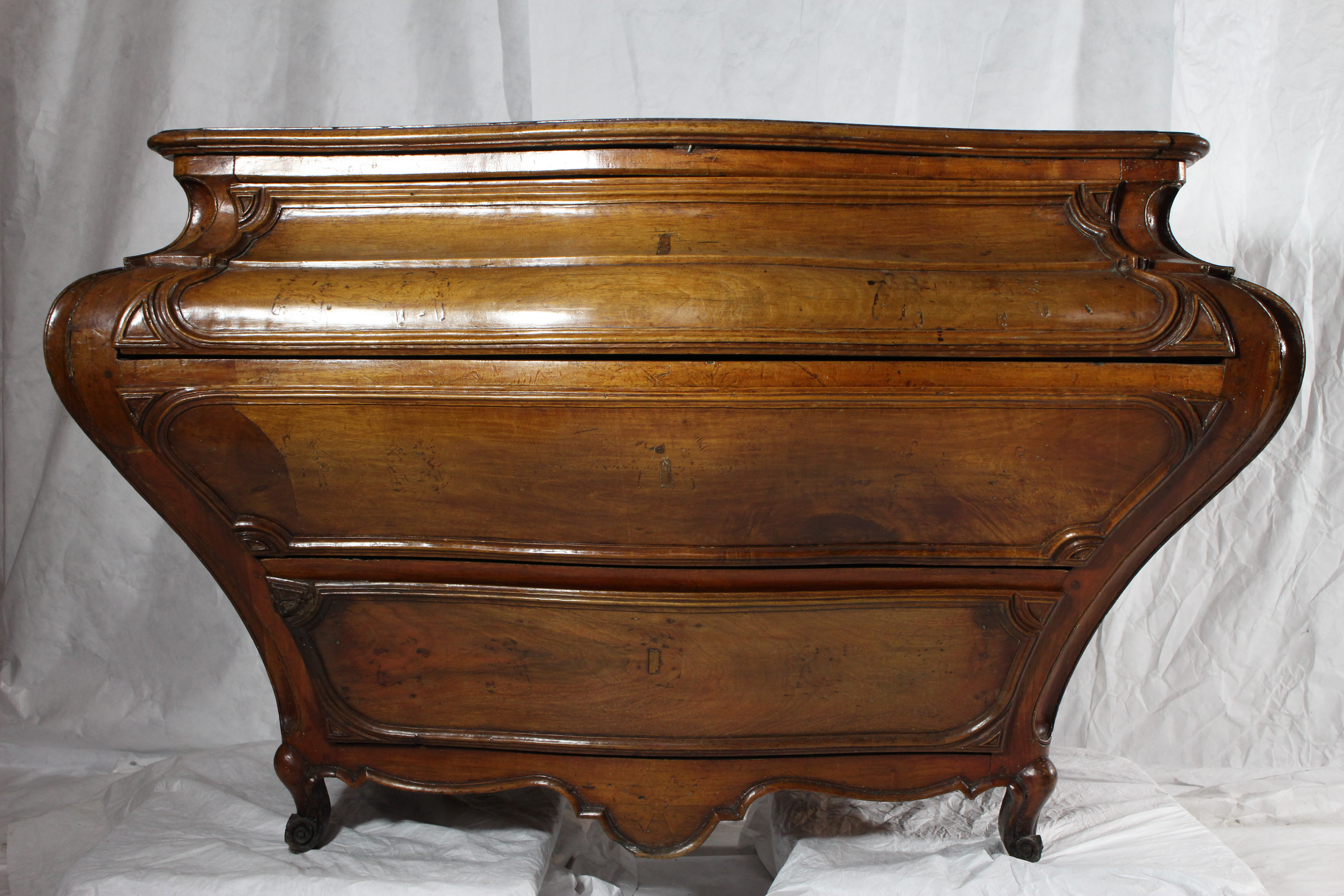 Commode tombeau style Louis XV, 1ère moitié 18e, Musée des Hospices civils de Lyon, 2007.0.6987.M